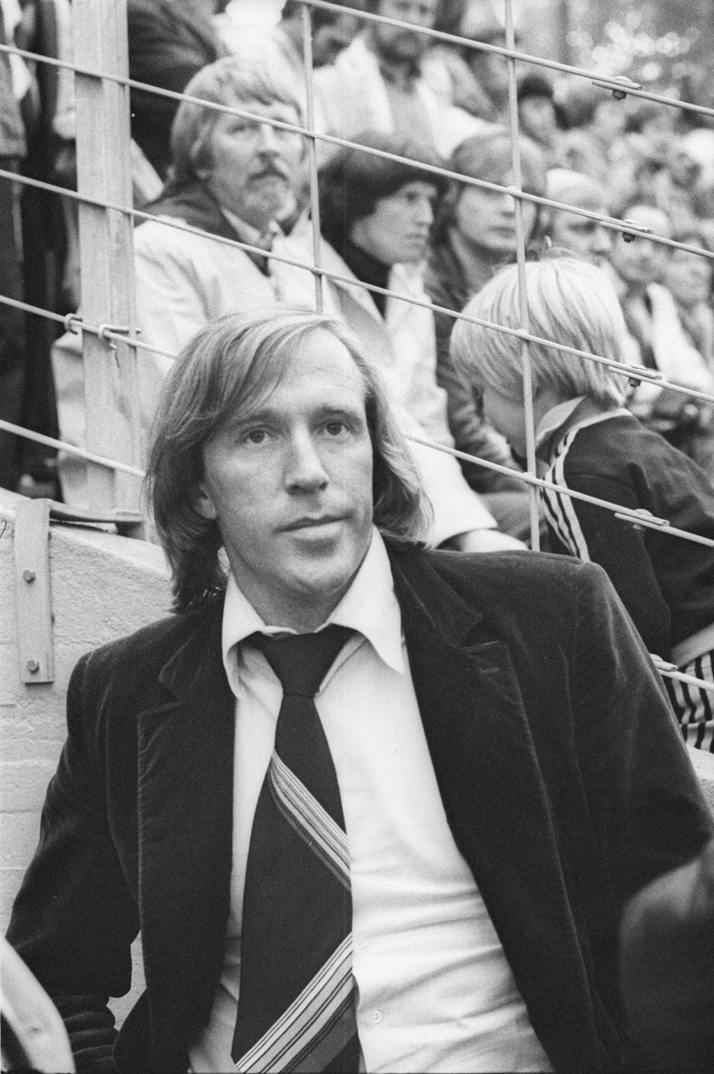 Manager des Fußball-Bundesligisten Hamburger SV (HSV) beim Freundschaftsspiel gegen Holstein Kiel.